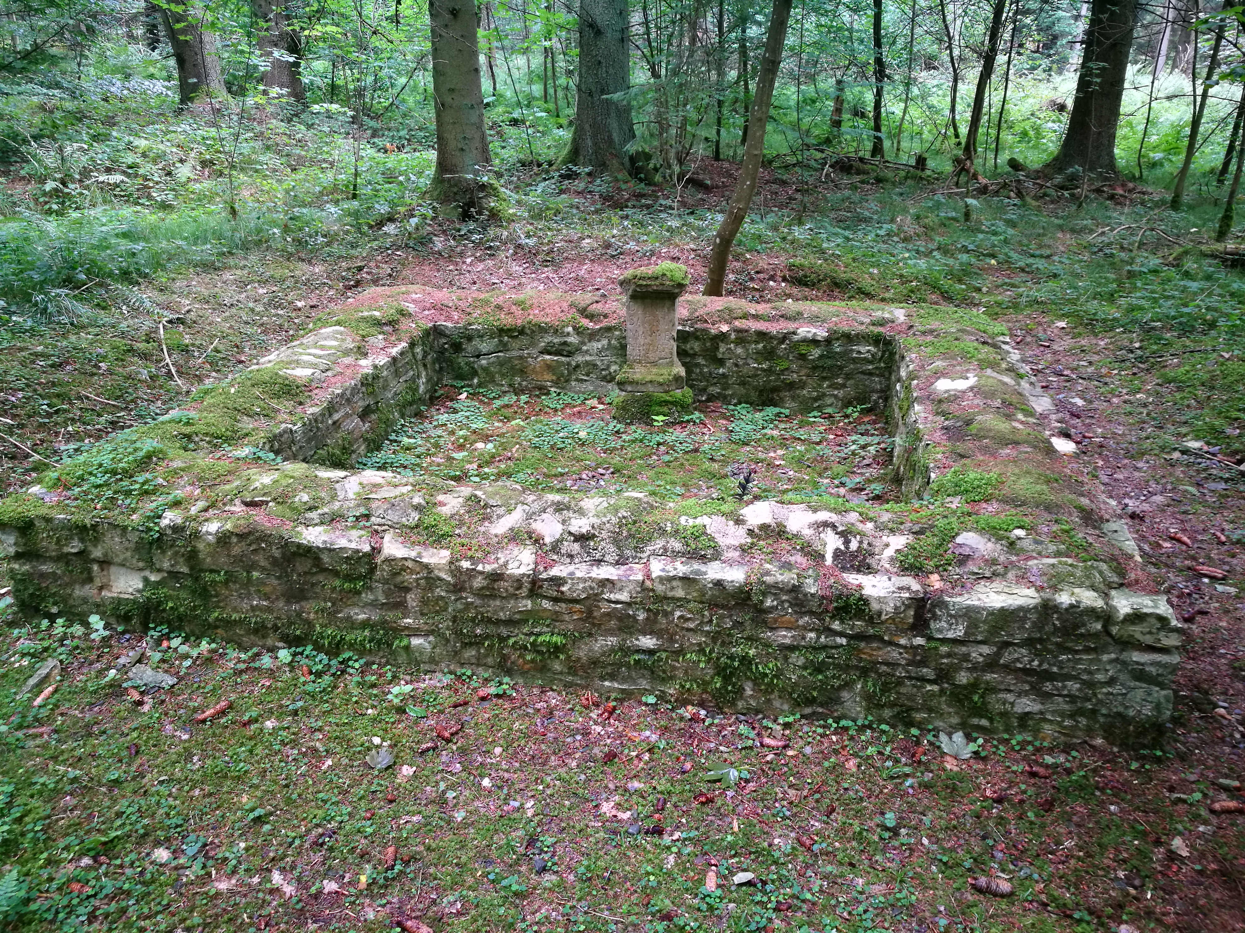 Deutschland (D) - Baden-Württemberg (BW) - Landkreis Sigmaringen (SIG) - Meßkirch: Villa Rustica - Tempelgebäude und Weihestein